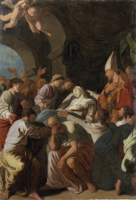 La Mort de la Vierge,Vue après restauration.